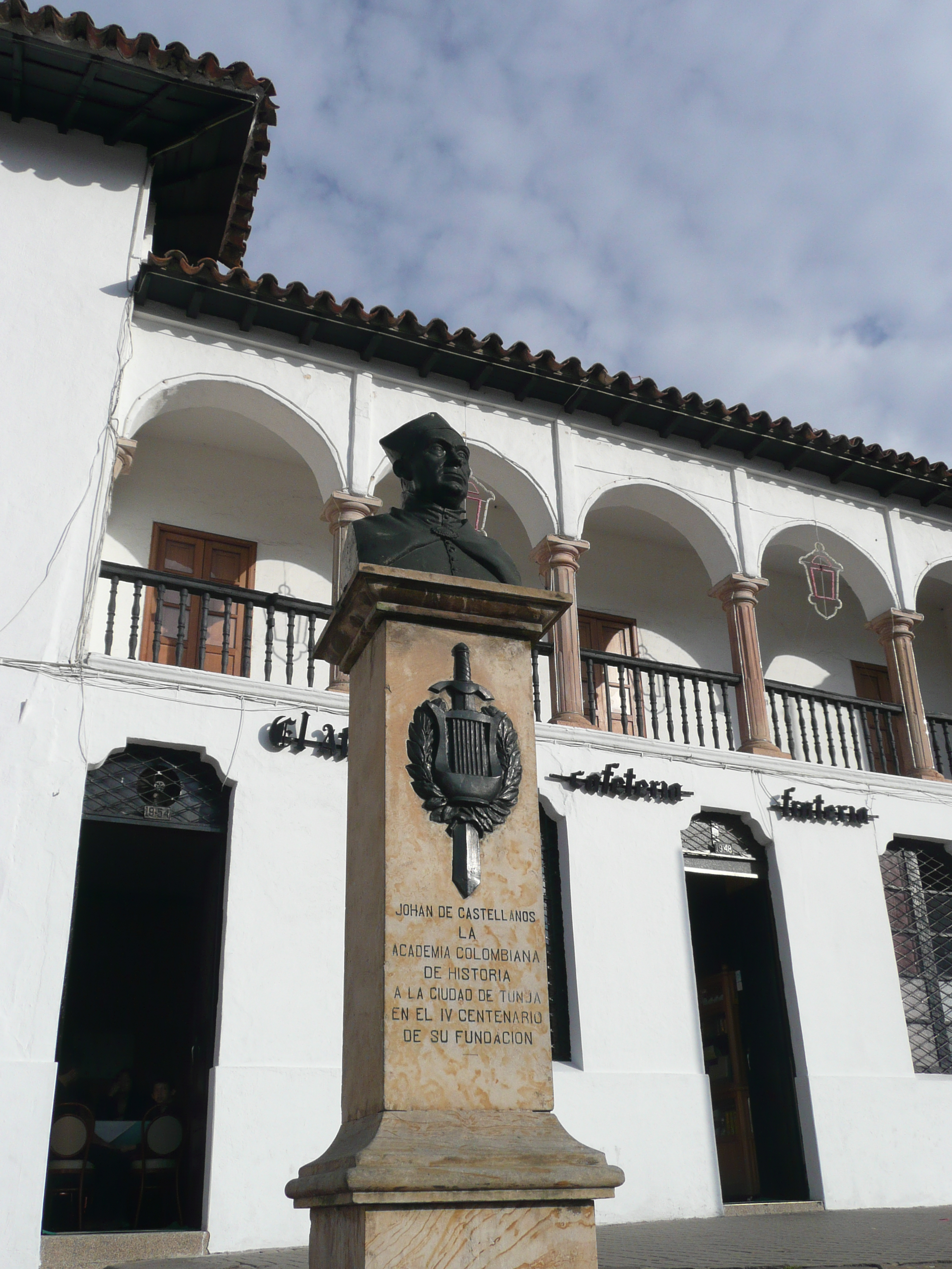 Don Johan de Castellanos, Plaza Mayor - Tunja, Boyacá (Colombia)